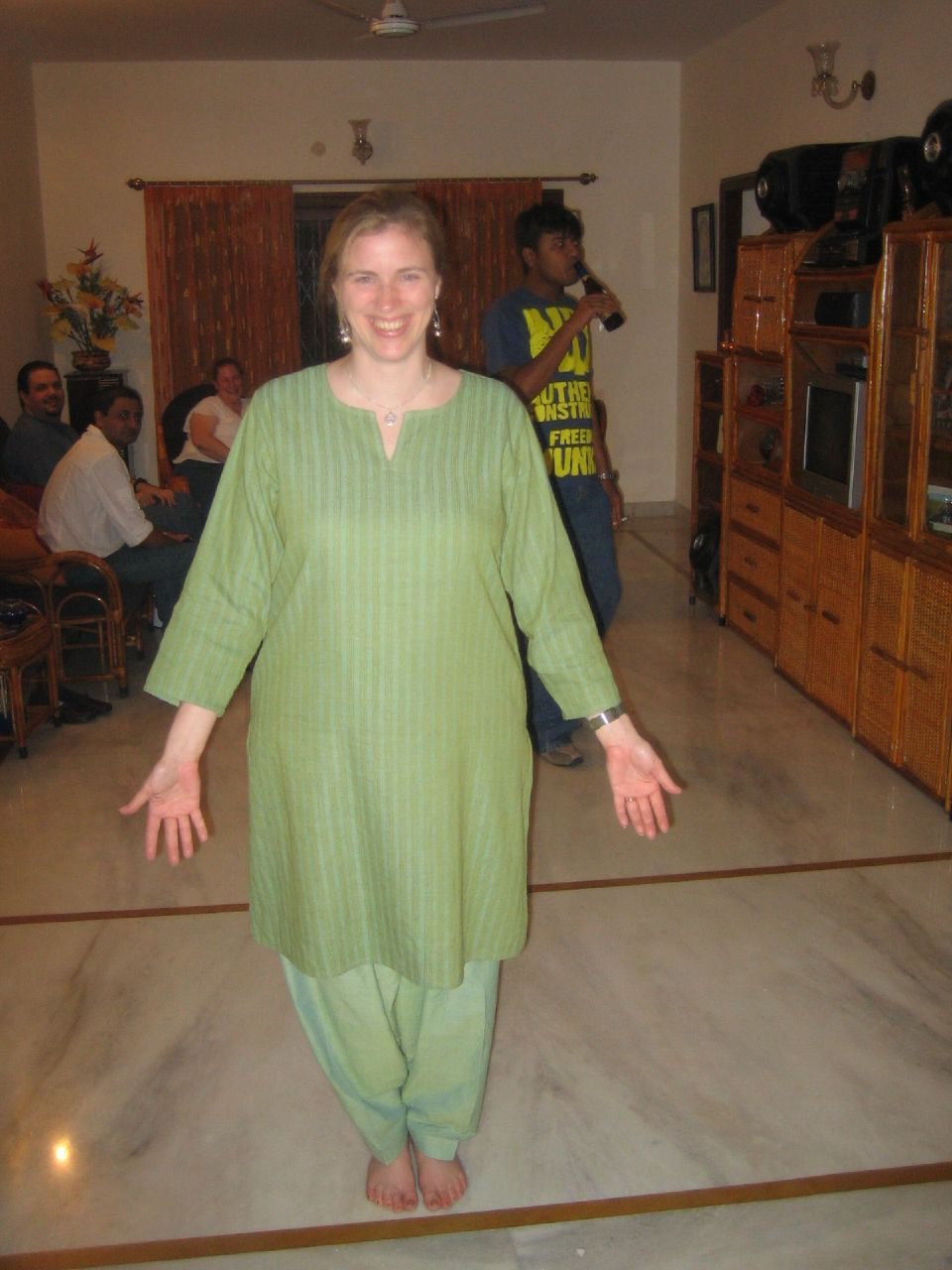 Western woman in Hyderabad wearing a green cotton salwar kameez.